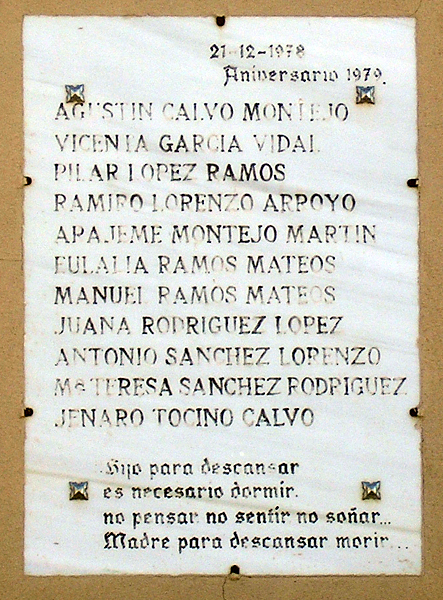 Placa con los nombres de los fallecidos en el accidente de Muñoz originarios de la localidad de San Muñoz.